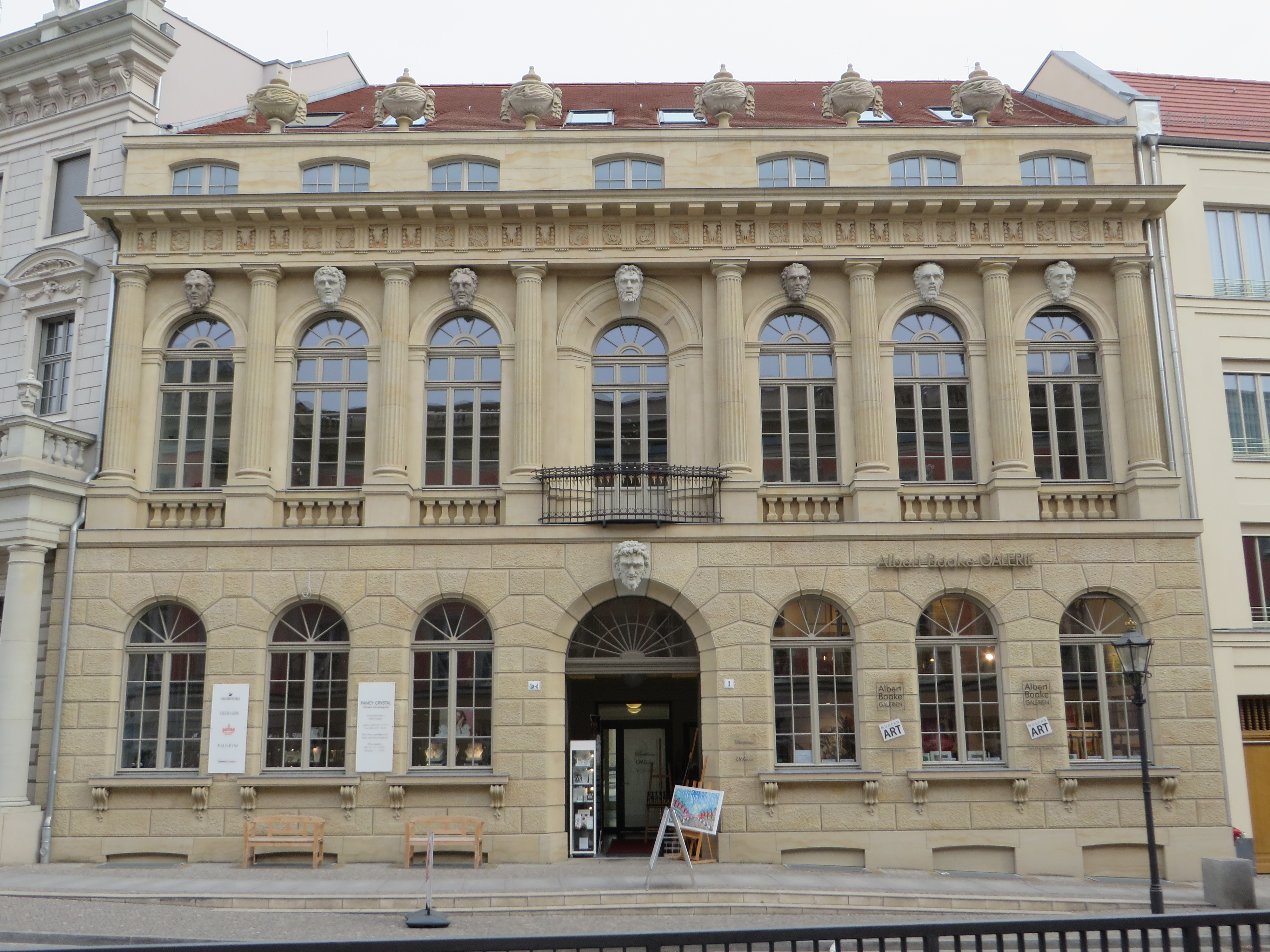 Palazzo Pompei, Potsdam 03/2017